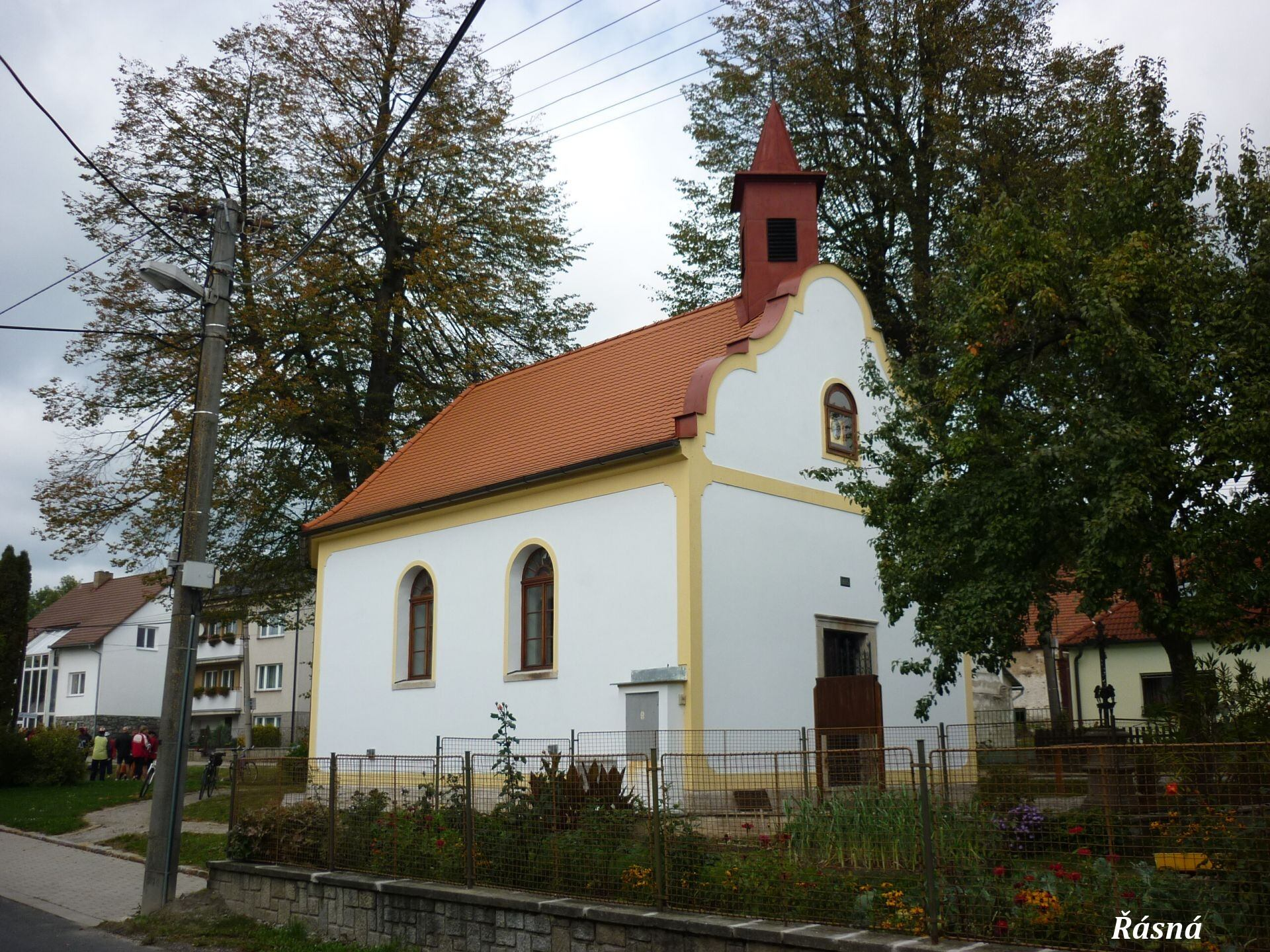 Kaple sv. Cyrila a Metoděje z roku 1885.